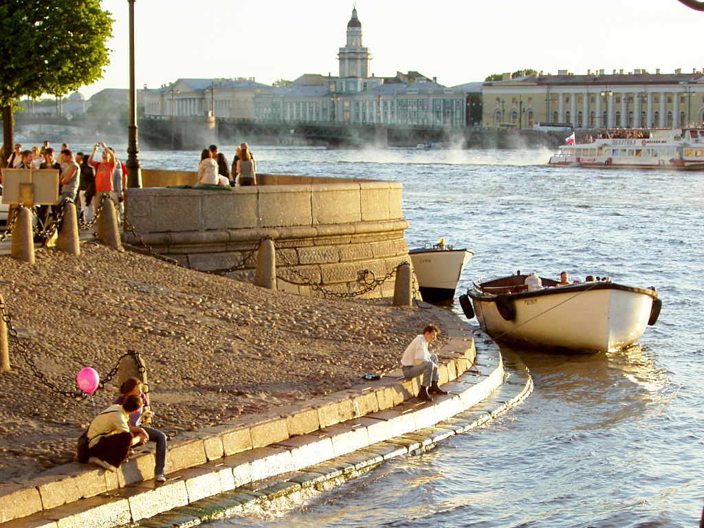 Neva, St. Petersburg, Russia